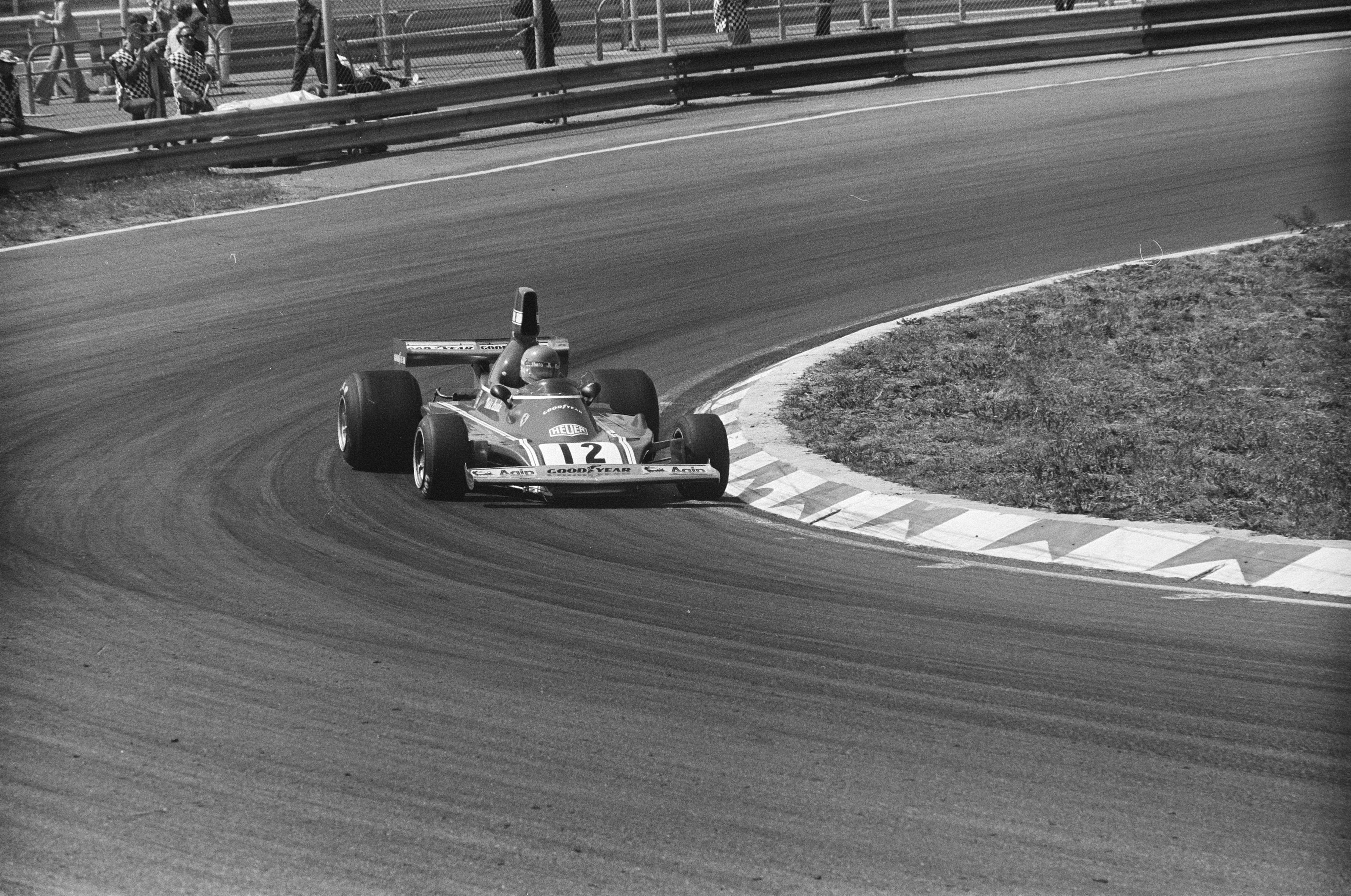 Grand Prix op Zandvoort, nr. 12 Niki Lauda.